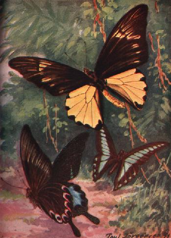 Plate from Brehm.Till vänster en färgillustration (=målning) kallad Tropiska fjärilar. Ur Brehm: Djurens liv, Malmö1931